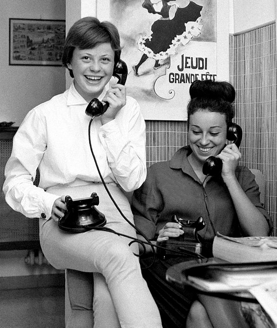 Daniela (left) and Anna Beneck